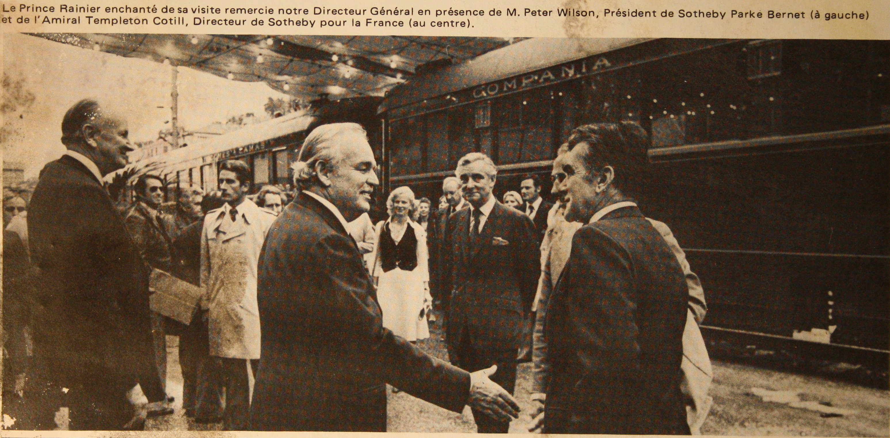 WL Prince Rainier avec Mr Dupont, président de la CIWLT, Vente Sotheby (c) wagons-lits diffusion